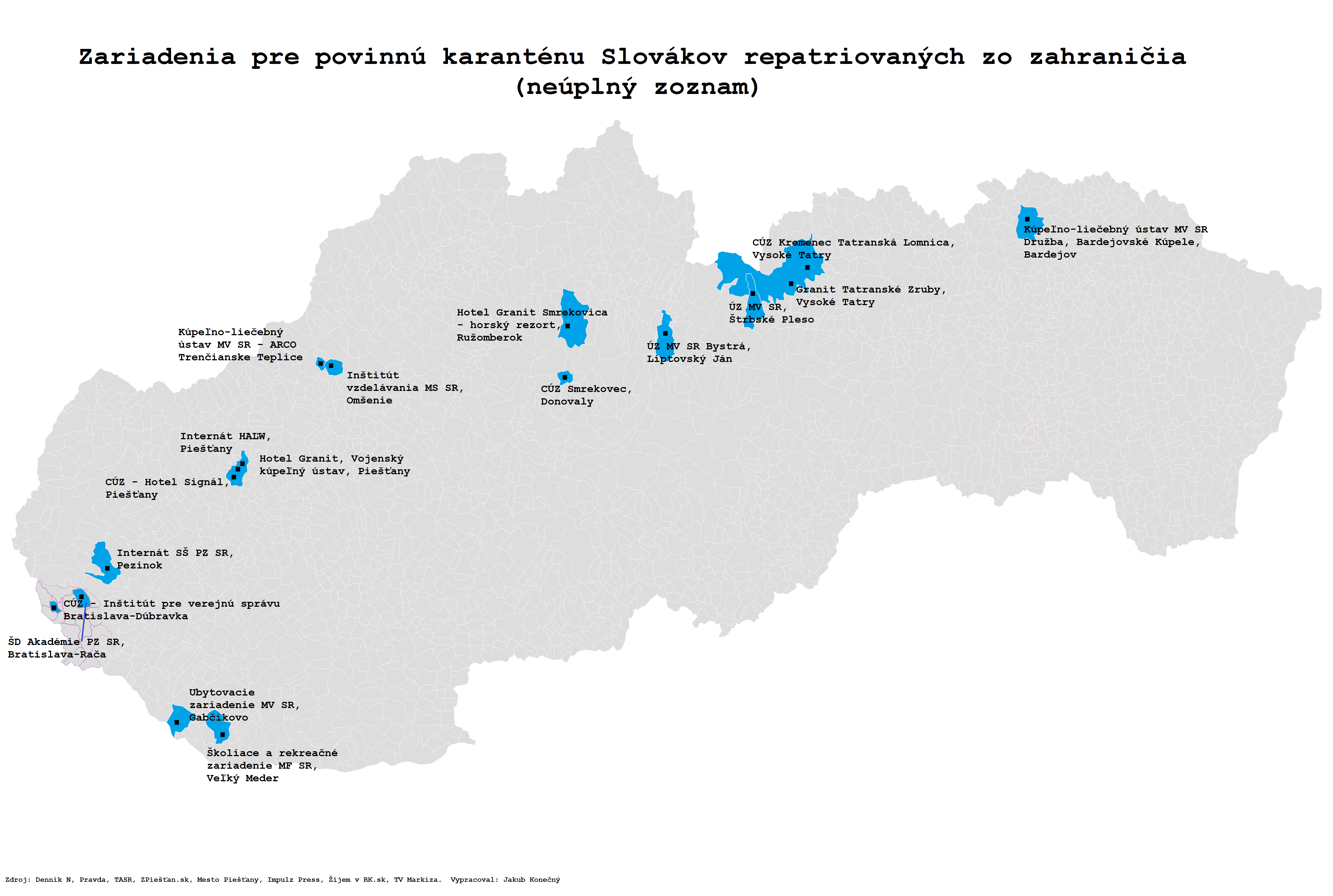 Zariadenia v zriaďovateľskej pôsobnosti štátu a VÚC, ktoré slúžili pre ubytovanie Slovákov, ktorí po príchode zo zahraničia boli povinní absolvovať povinnú dvojtýždňovú karanténu. Zoznam nie je kompletný, vložené len medializované zariadenia.